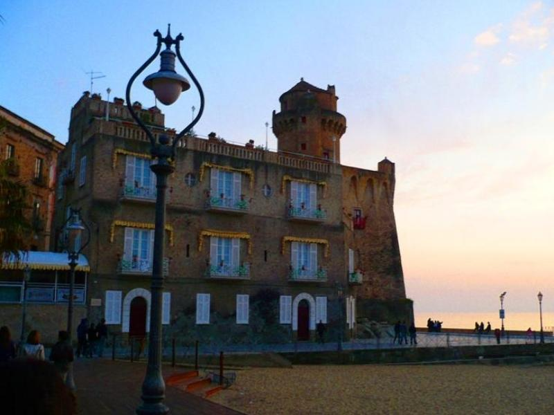 LA torre pagliarola, incastonata nel palazzo perrotti a s.maria di castellabate